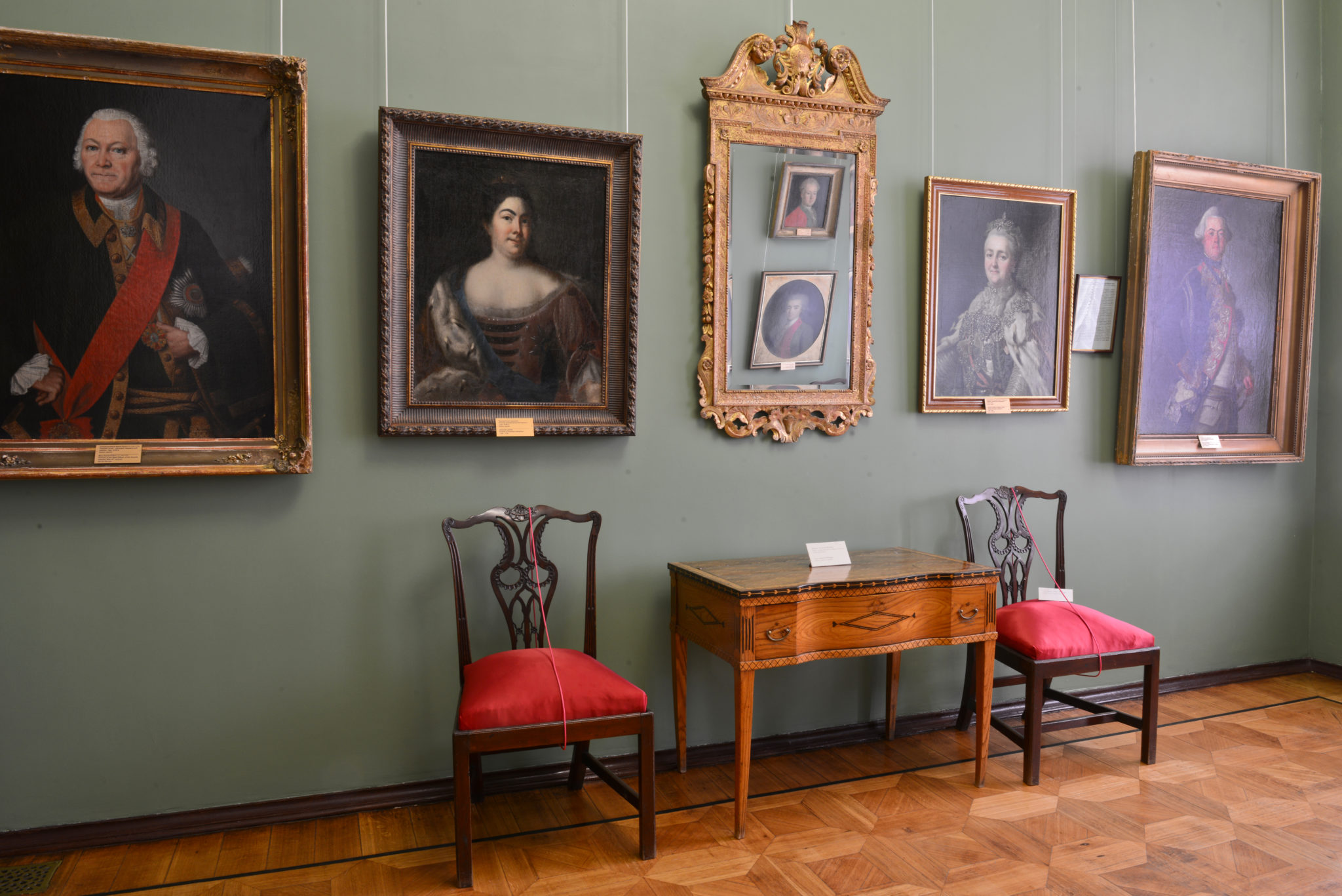 Портретный зал